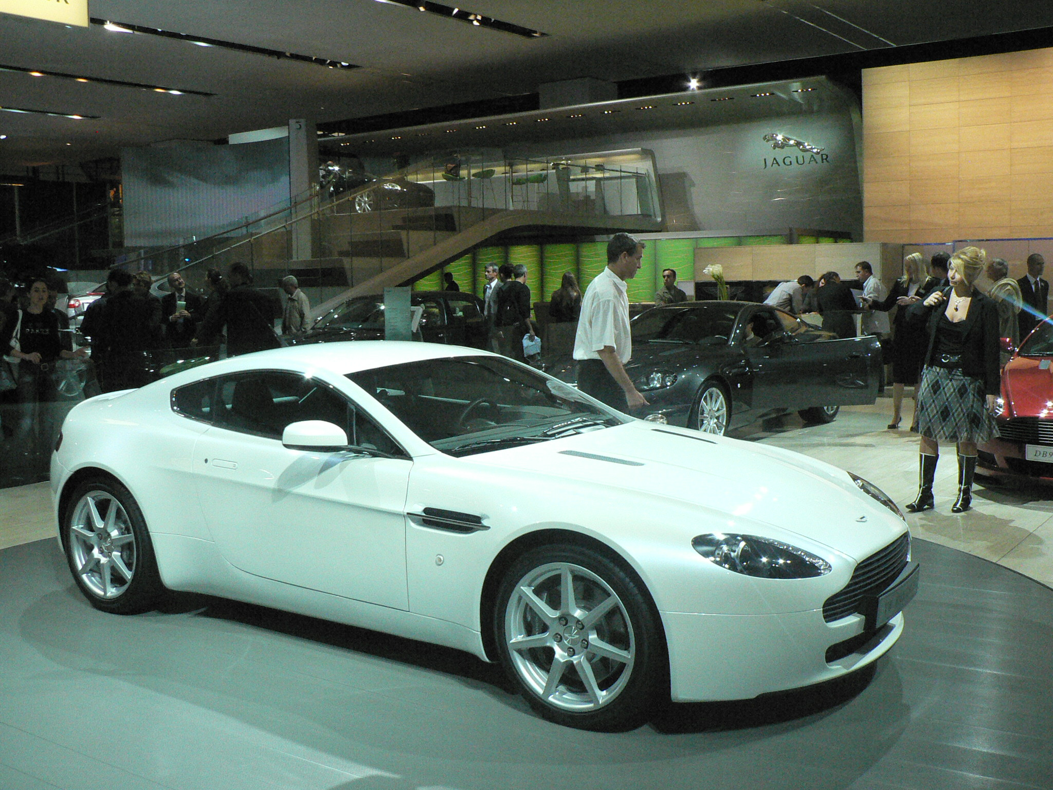 Mondial de l'automobile, Paris 2006